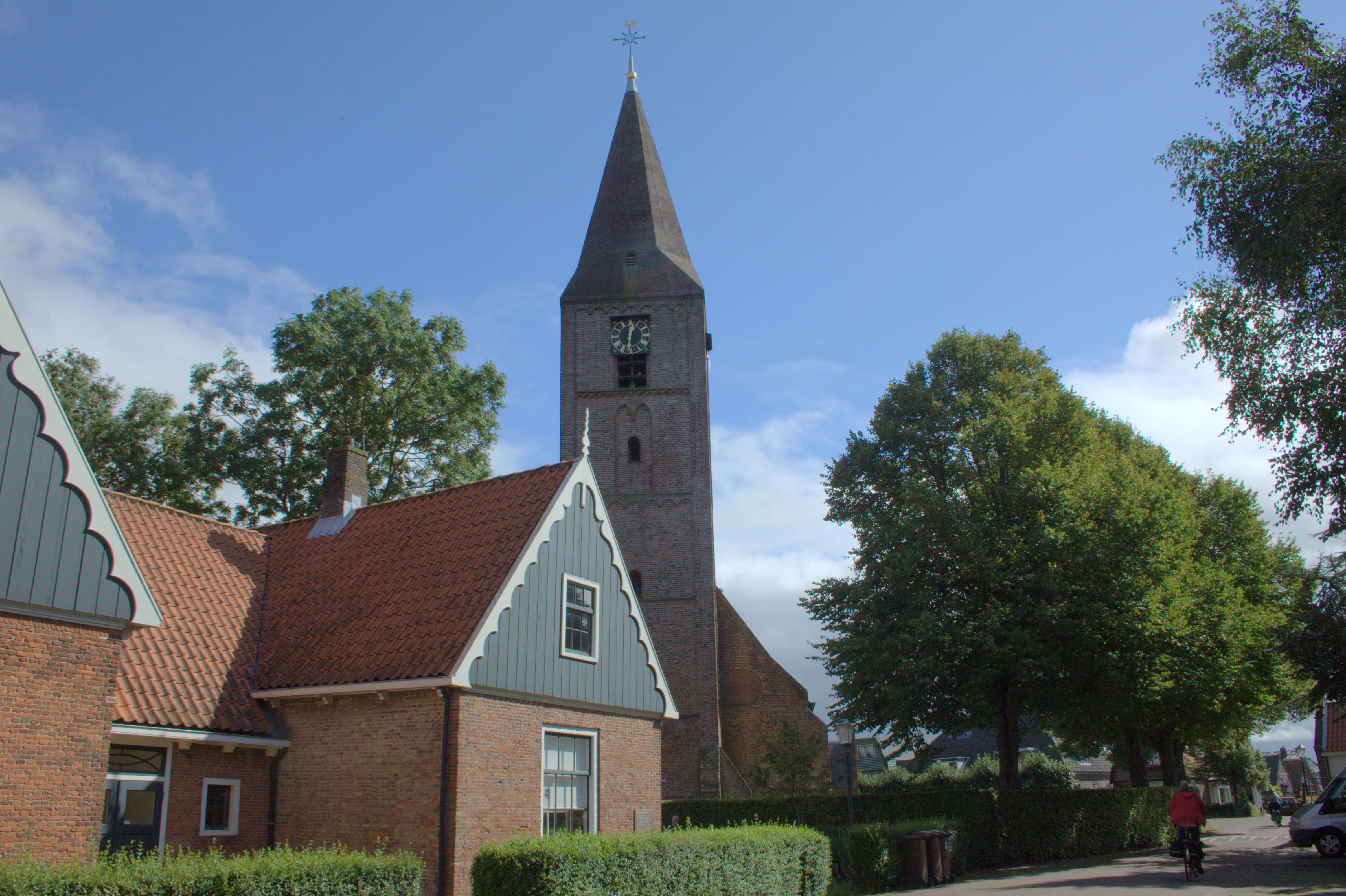 De Hervormde kerk in Uitgeest met een 14e eeuwse toren. Bijzonder is de van baksteen gemetselde spits